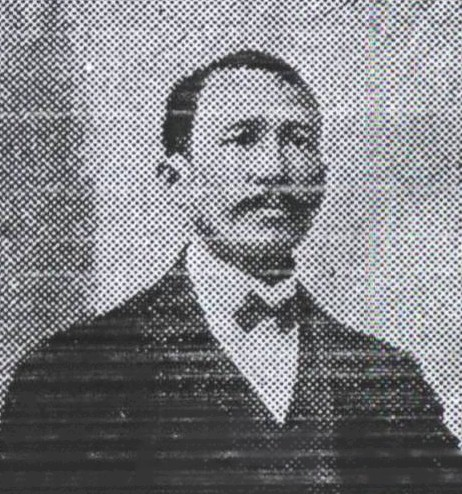 Tomas Funes (1855-1921)